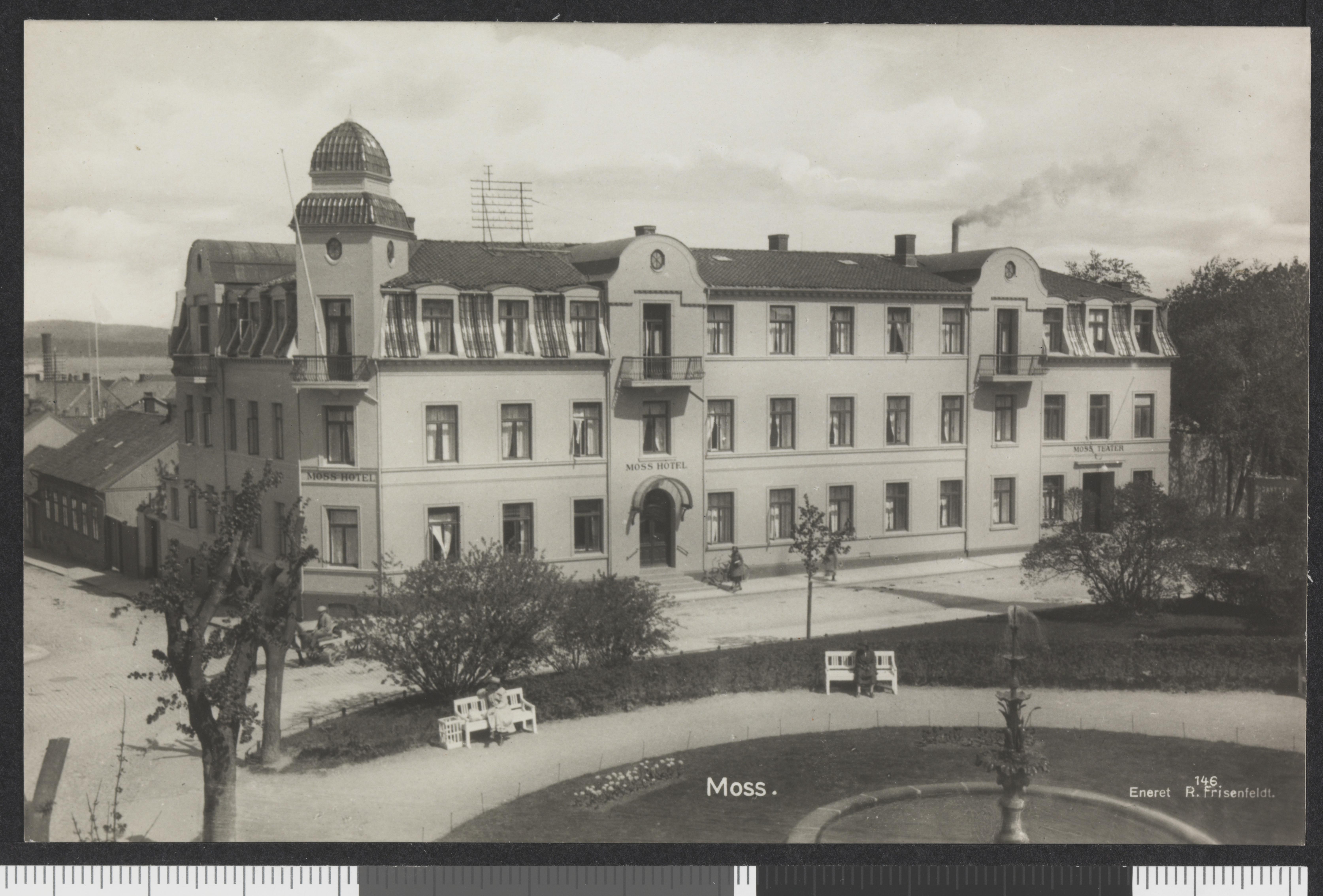 Bildet er hentet fra Nasjonalbibliotekets bildesamling Dronningens gate,Moss, Moss, Østfold